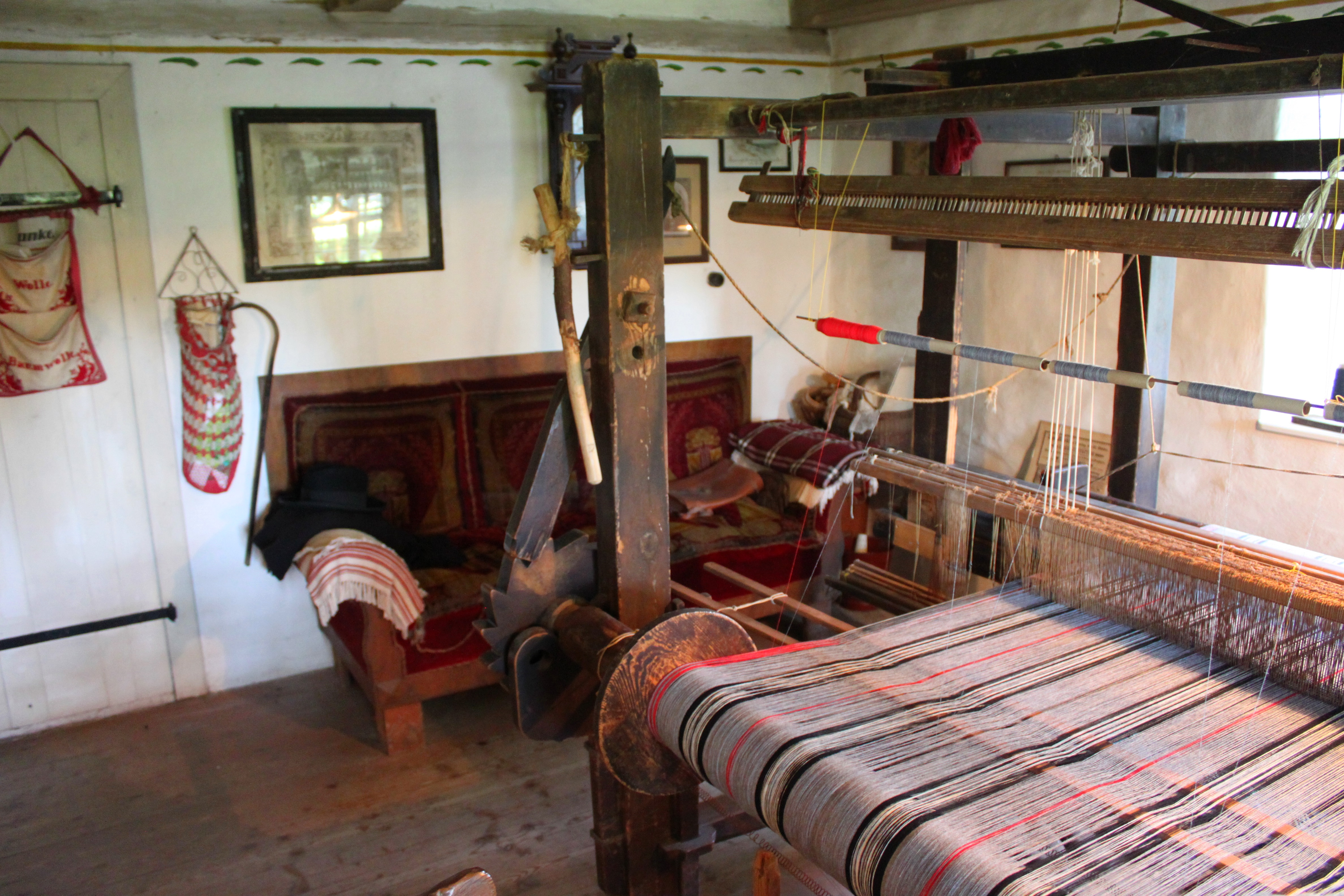 Webstuhl im Weberhaus, Neudorf 27, Schauenstein, Wohnstallhaus mit Satteldach, Ende des 18. Jahrhunderts erbaut, ist heute als Heimatmuseum eingerichtet, Baudenkmal D-4-75-165-21This is a photograph of an architectural monument.